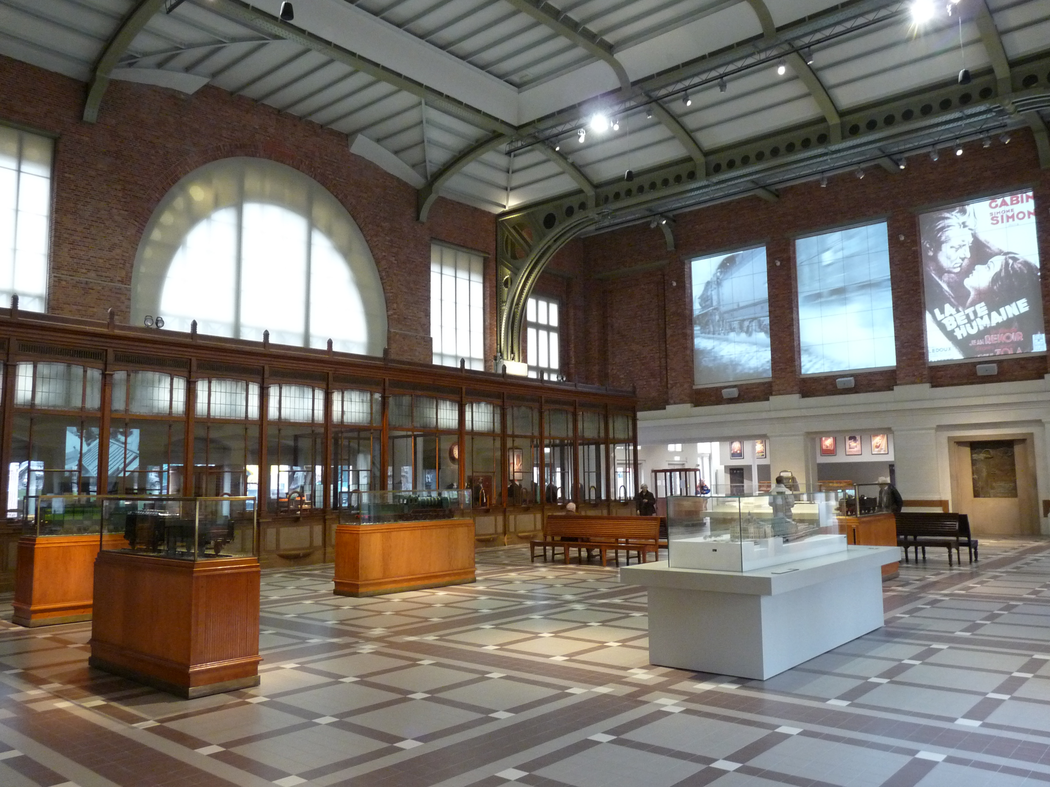 Vroegere lokethal nu in gebruik als museumzaal